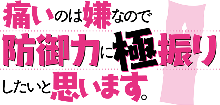 Logo de la serie Itai no wa Iya nano de Bōgyoryoku ni Kyokufuri Shitai to Omoimasu.